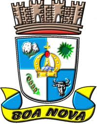 Brasão da cidade de Boa Nova, Bahia